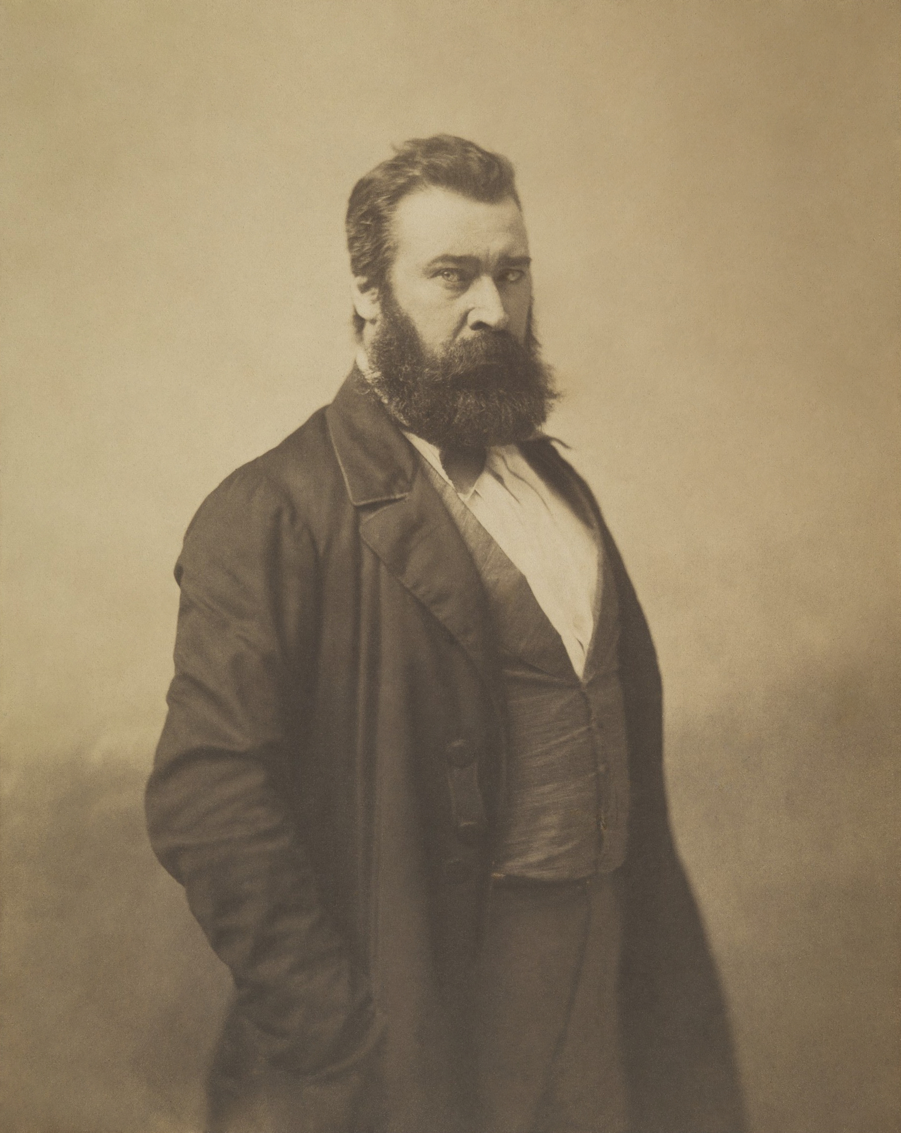 Painter Jean-François Millet by Nadar